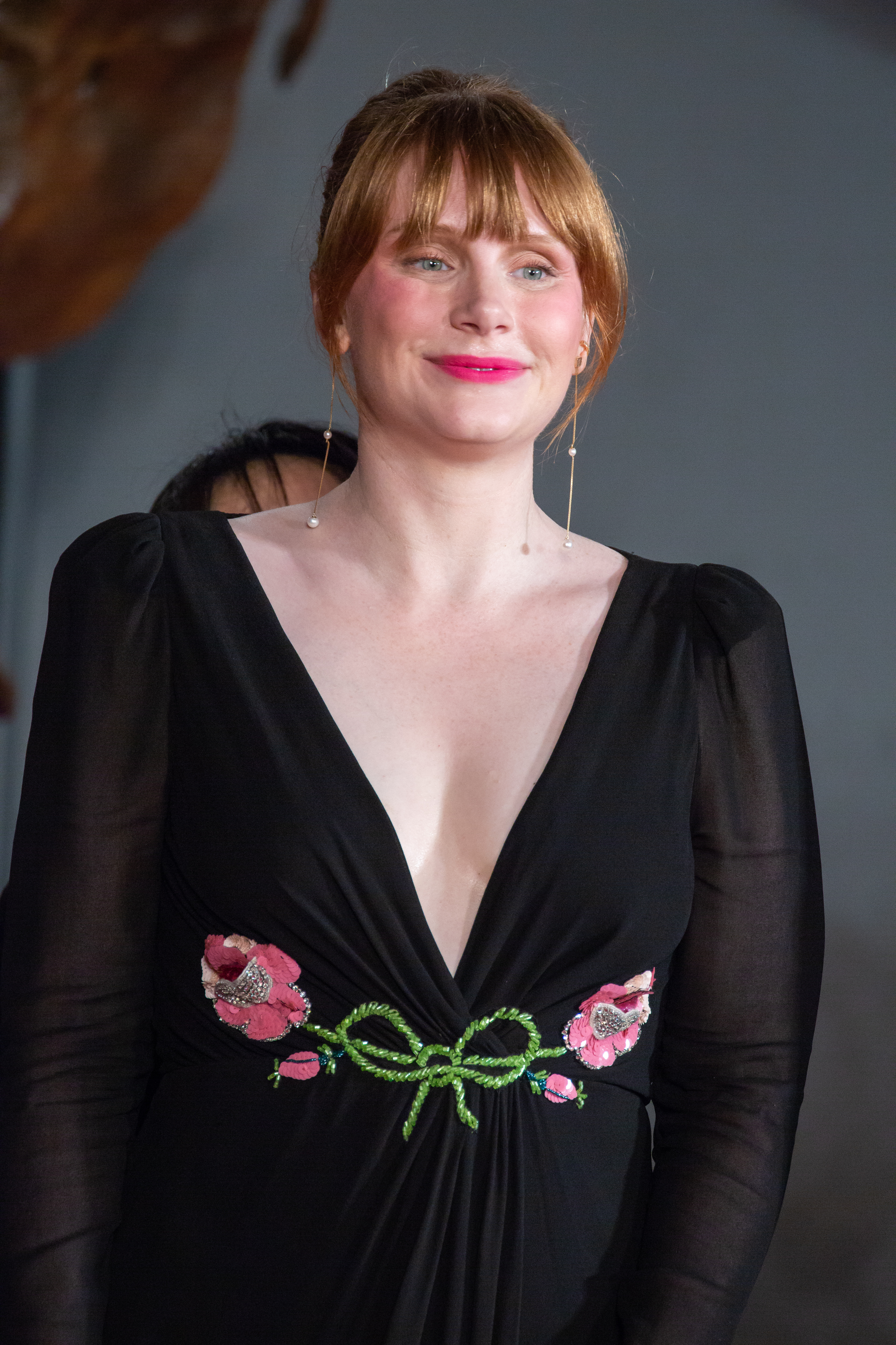 ジュラシック・ワールド/炎の王国 ジャパン・プレミア レッドカーペット ブライス・ダラス・ハワード